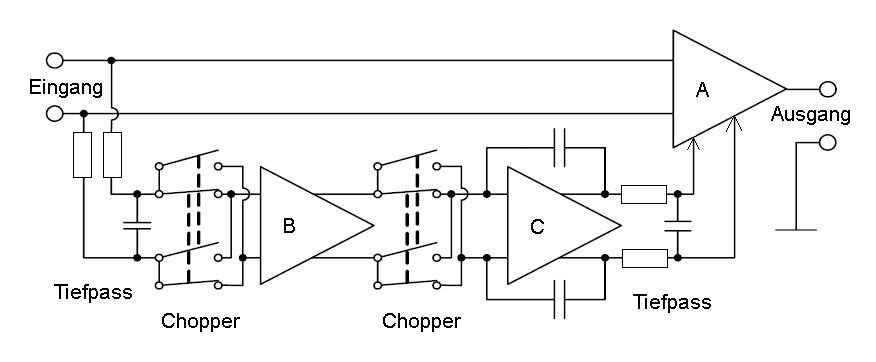 Prinzipschaltung eines modernen Auto-Zero-Verstärkers